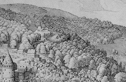 Molkenkur – hier lag die obere Heidelberger Burg (Ausschnitt aus dem Merian-Stich von 1620)